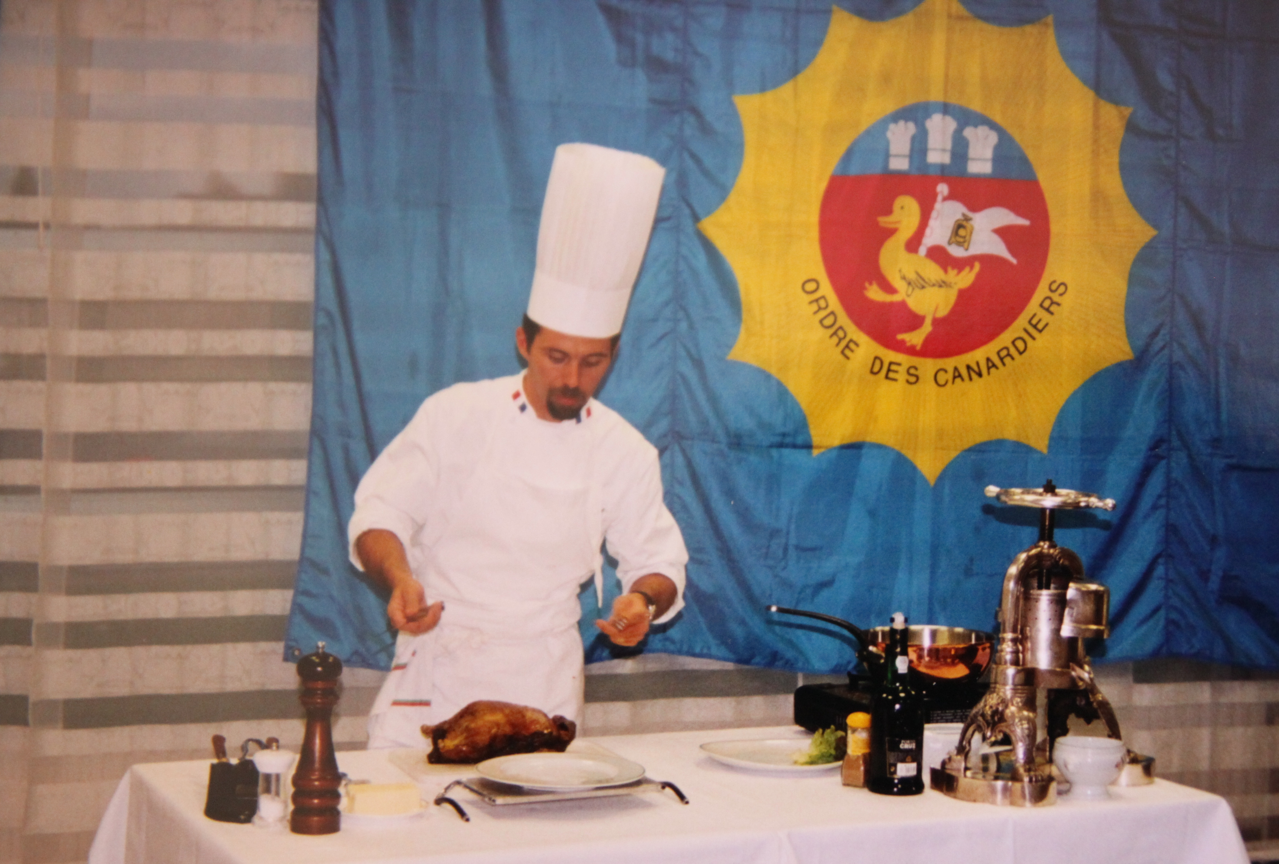 Concour de cuisine.